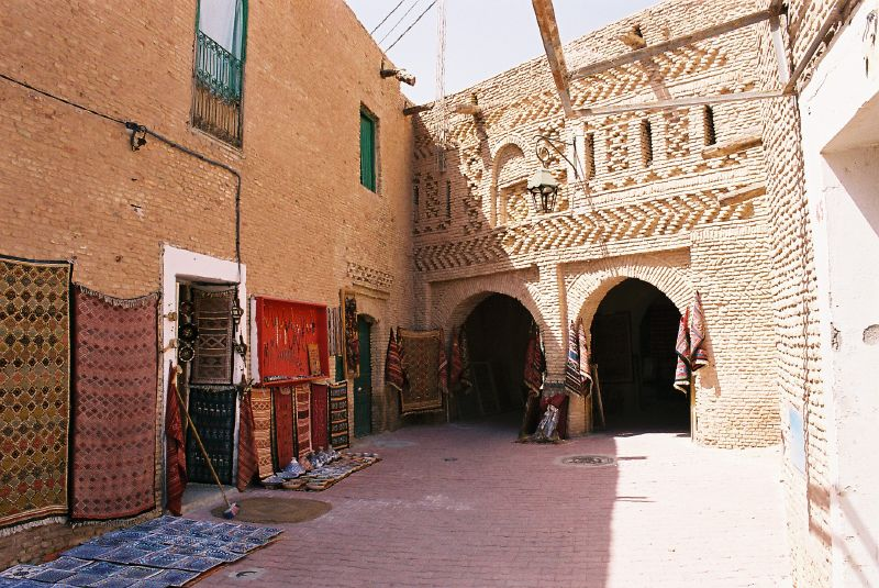 Tozeur (Tunisia) - Medina's entrance